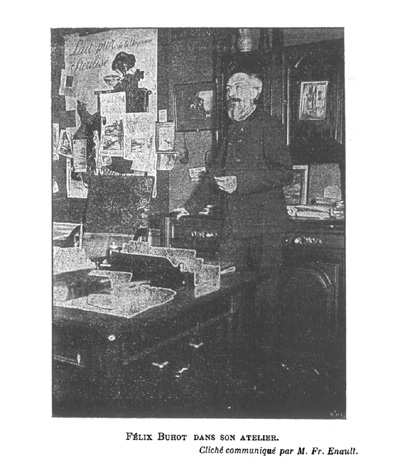 Félix Buhot dans son atelier